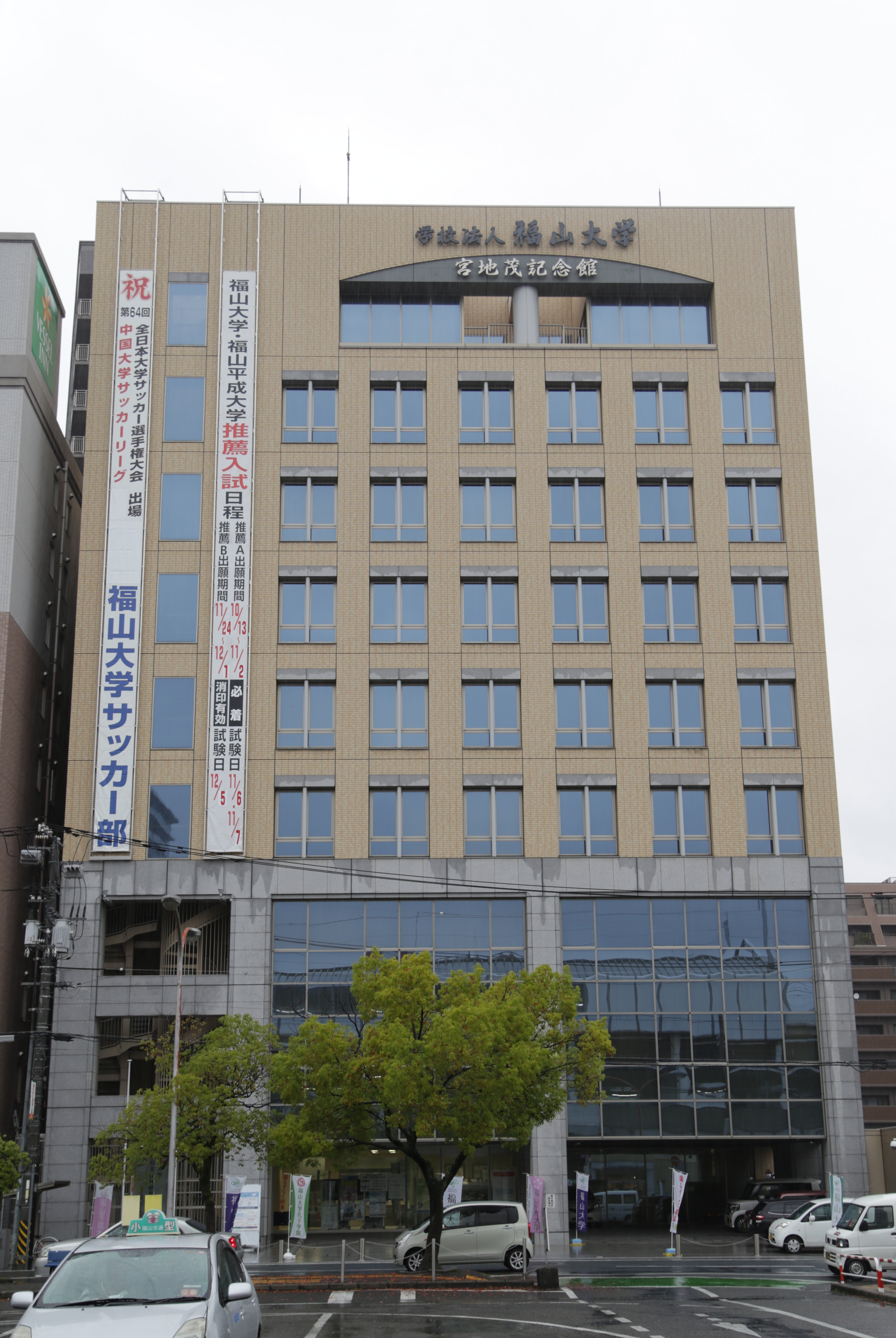 福山大学宮地茂記念館